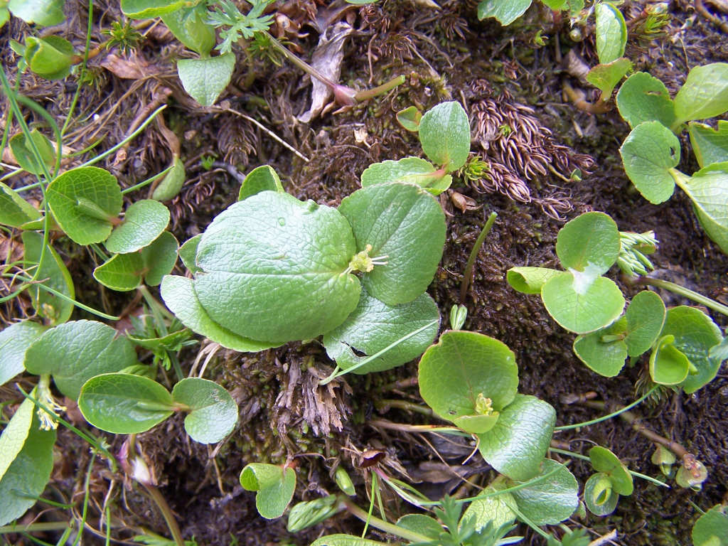 Salix herbacea (pl. wierzba zielna), habitat: Tatra Mountains, Dolina Gąsienicowa